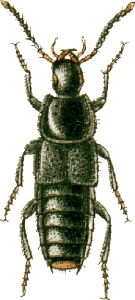 This file has been extracted from another file: Jacobs14.jpg